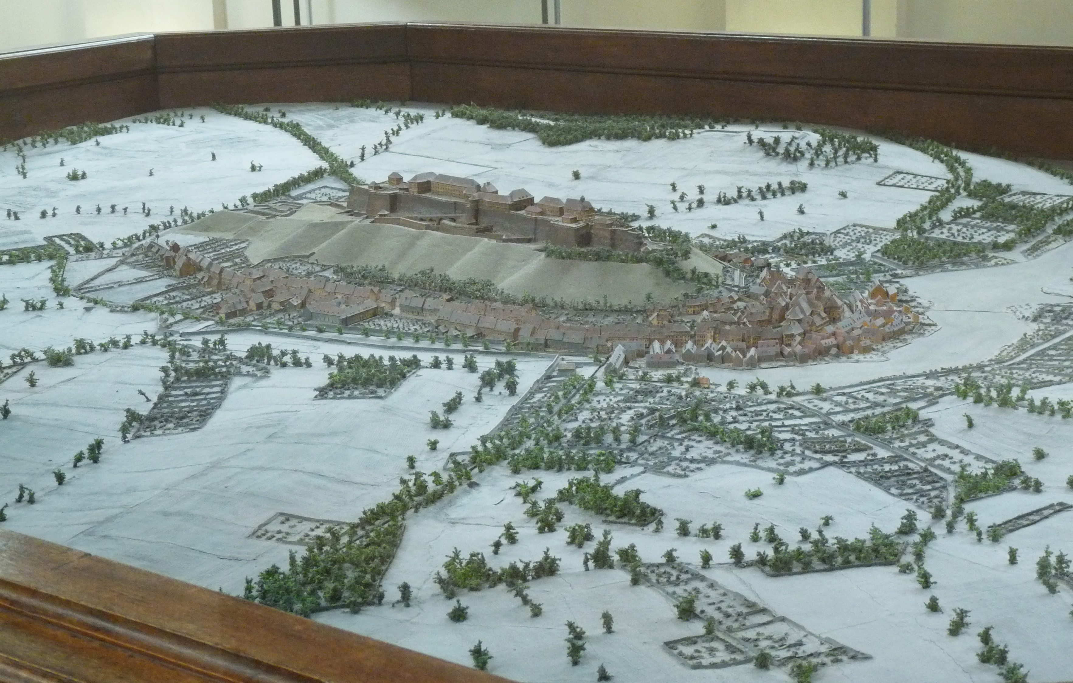 Citadelle de Bitche : plan-relief original de Bitche (1794, échelle 1:600, dimensions 4,20 m x 3,50 m). Classé Monument historique en 1983.